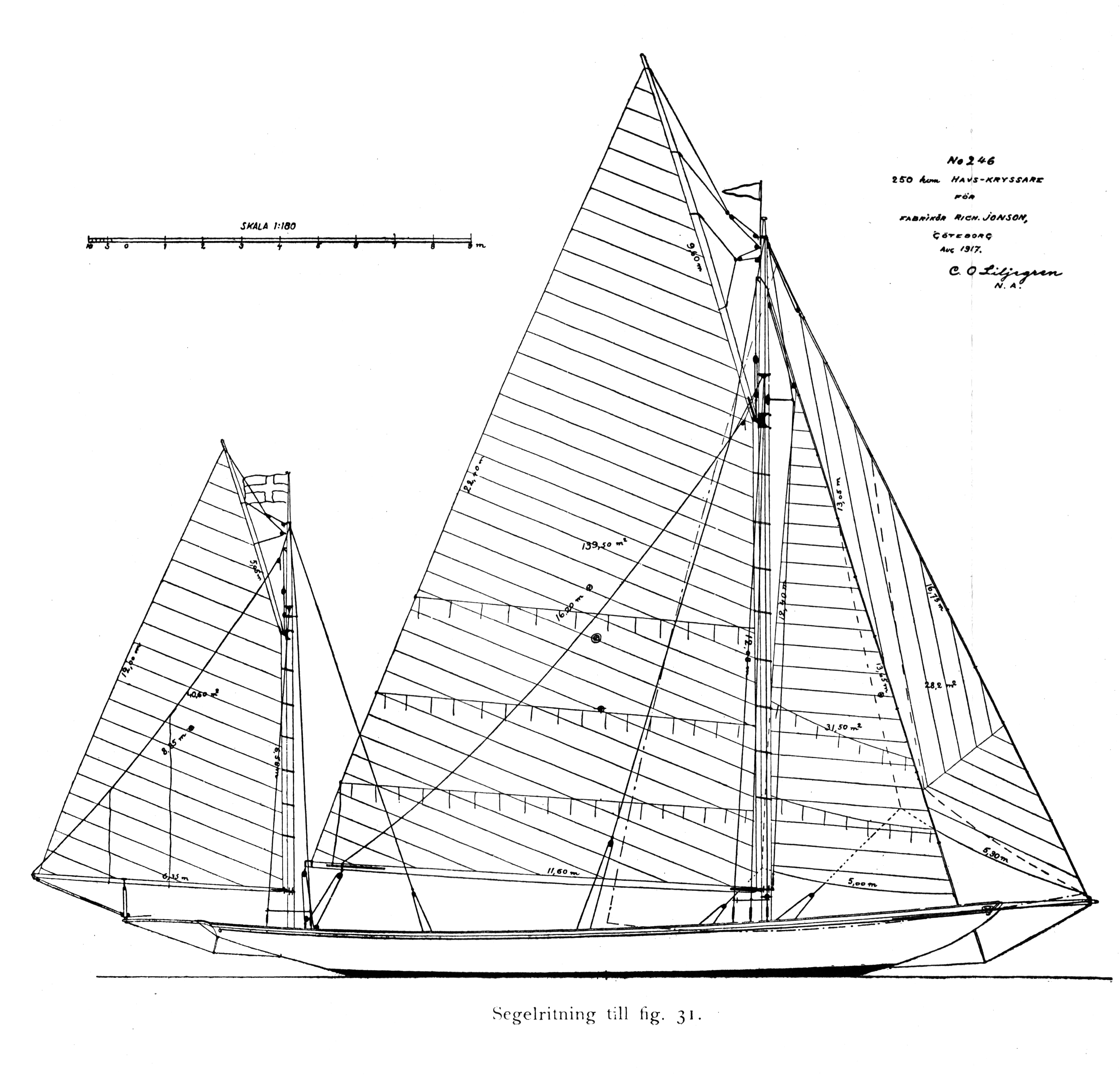 Yawl nr. 246 av C O Liljegren (ritning 1917)